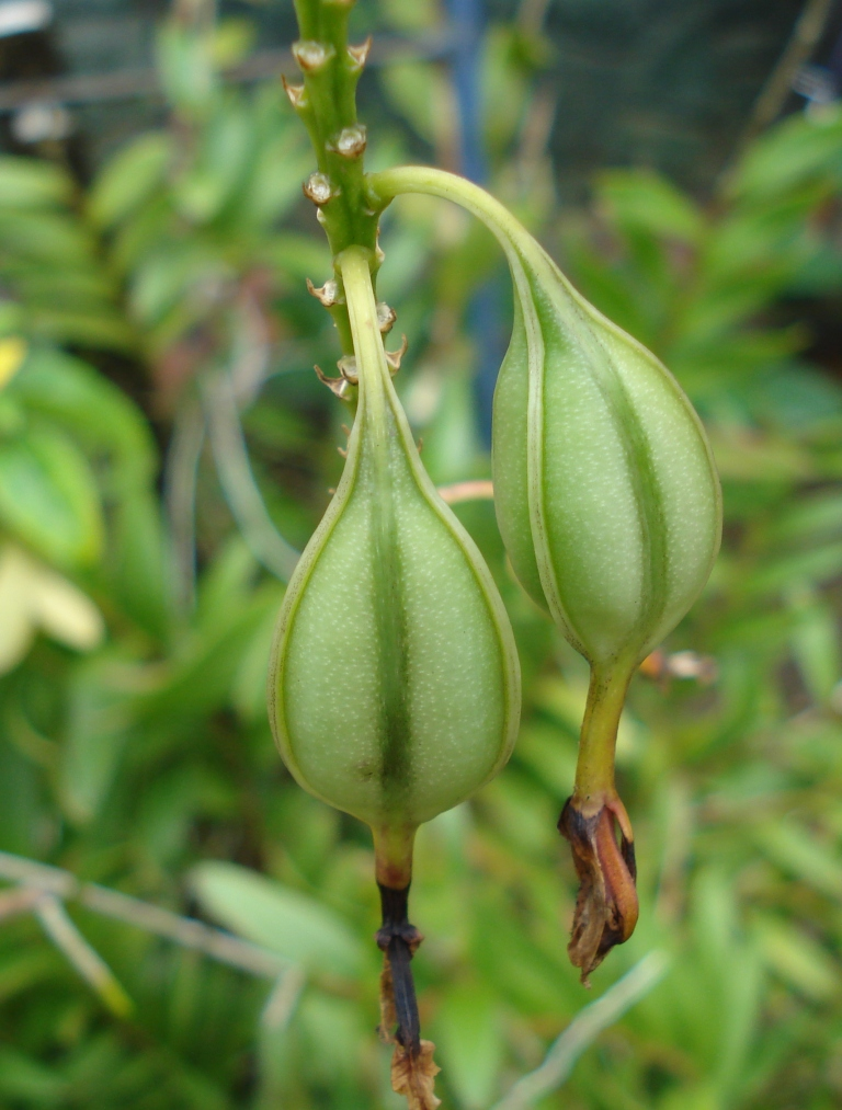 Orchid-seed